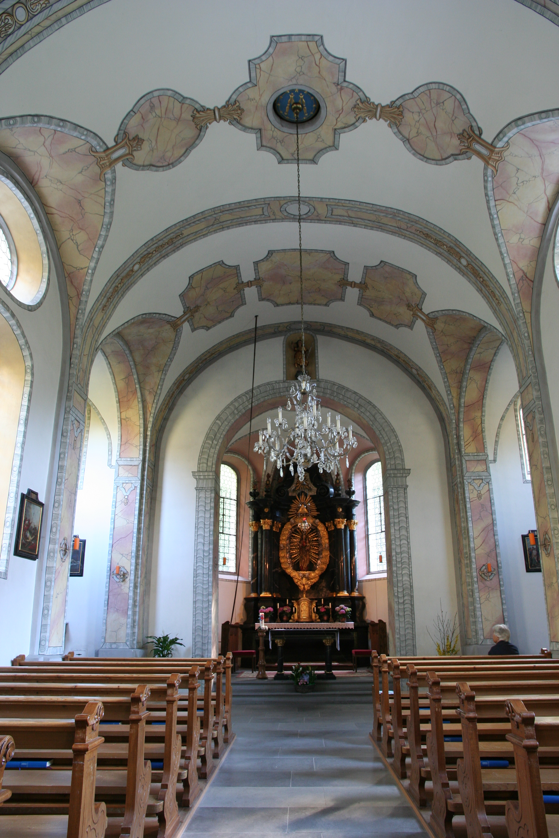 Wallfahrskapelle Jonental